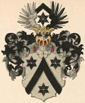 Düsterlohi suguvõsa parunivapp